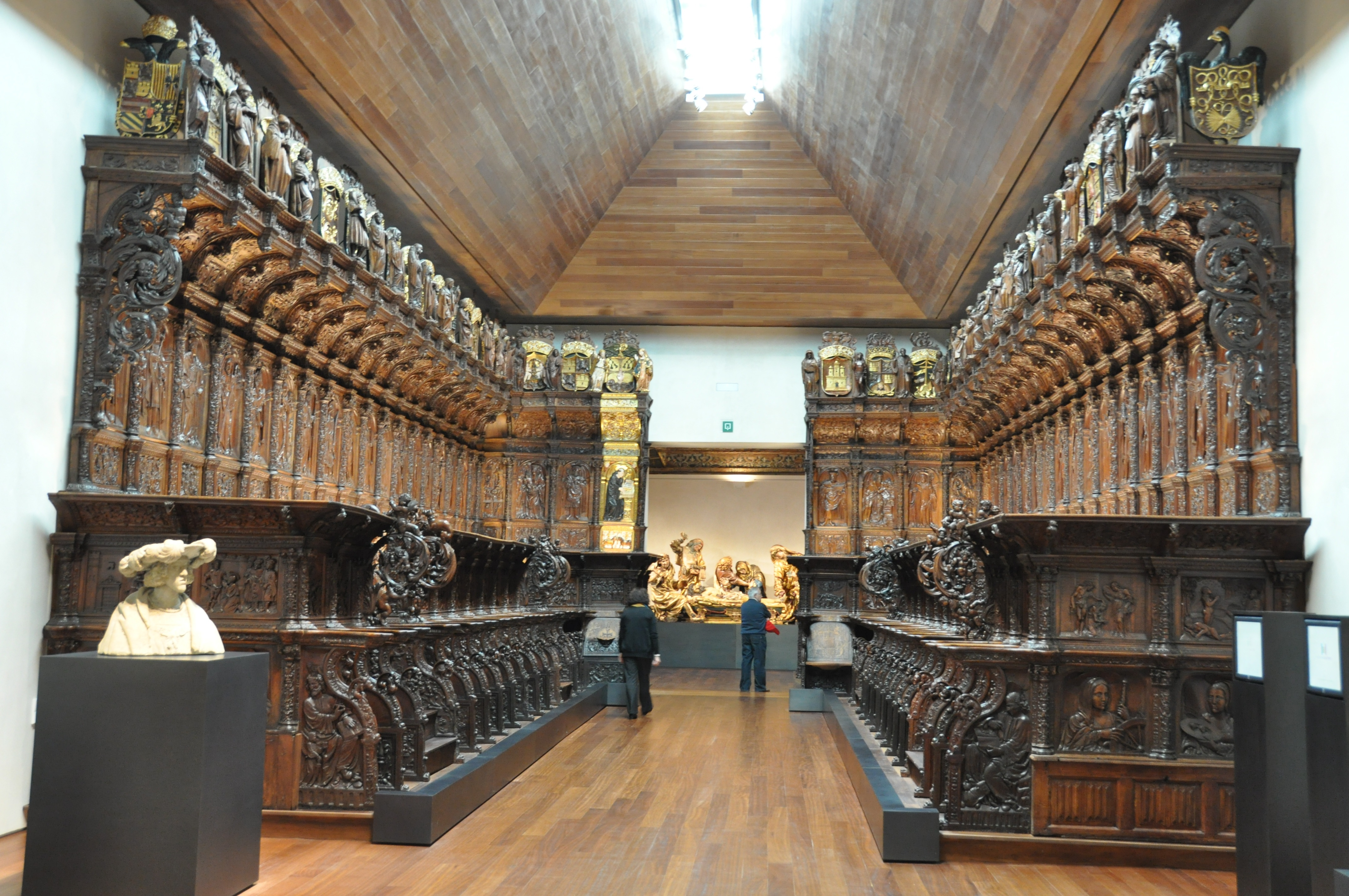 Antigua Sillería del Coro bajo de la iglesia del monasterio de San Benito el Real de Valladolid, actualmente en el Museo Nacional de Escultura. Traza y dirección del maestre Andrés de Nájera ó de San Juan.